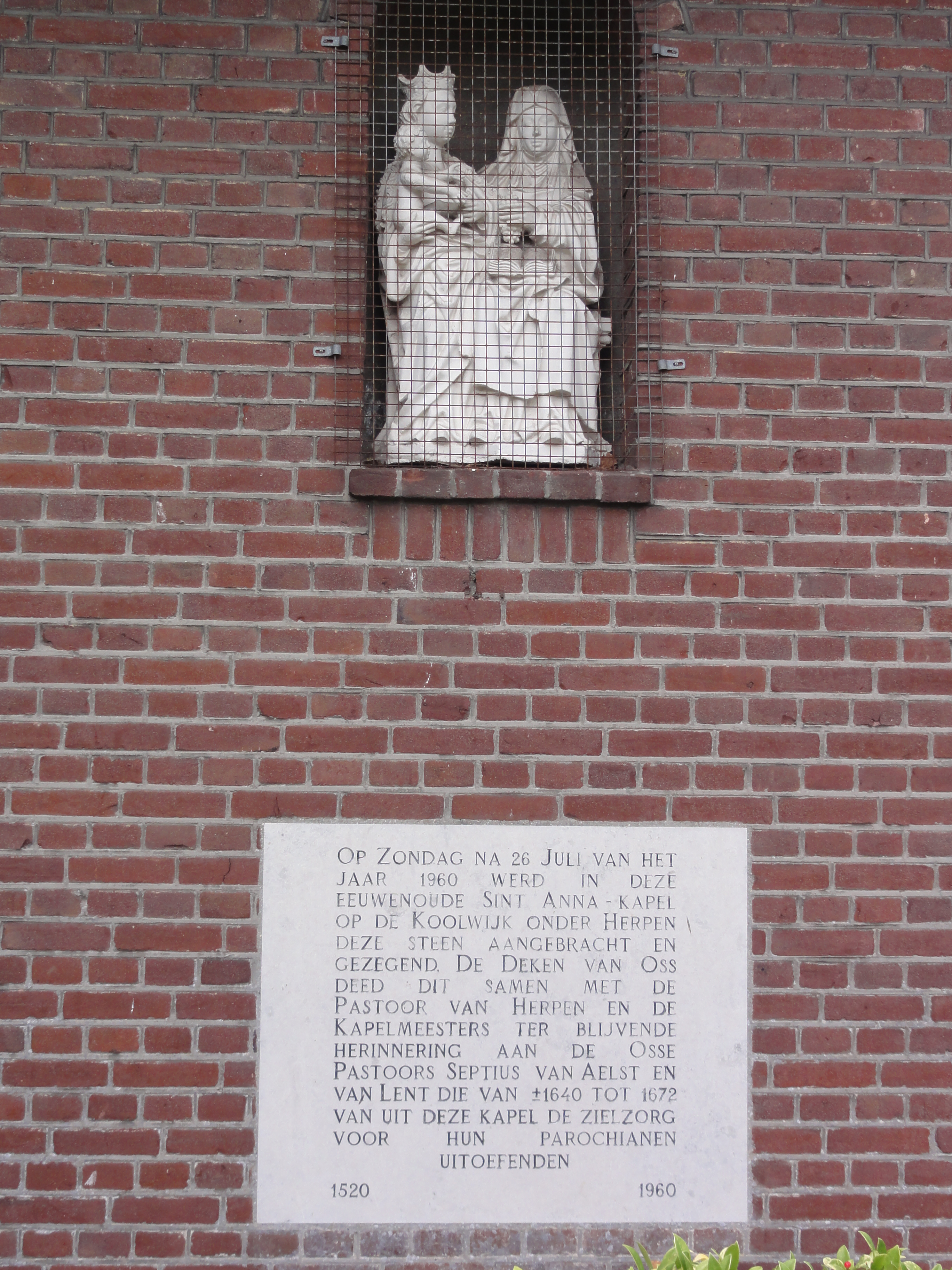 Groot Koolwijk, St.Annakapel, plaquette en beeld